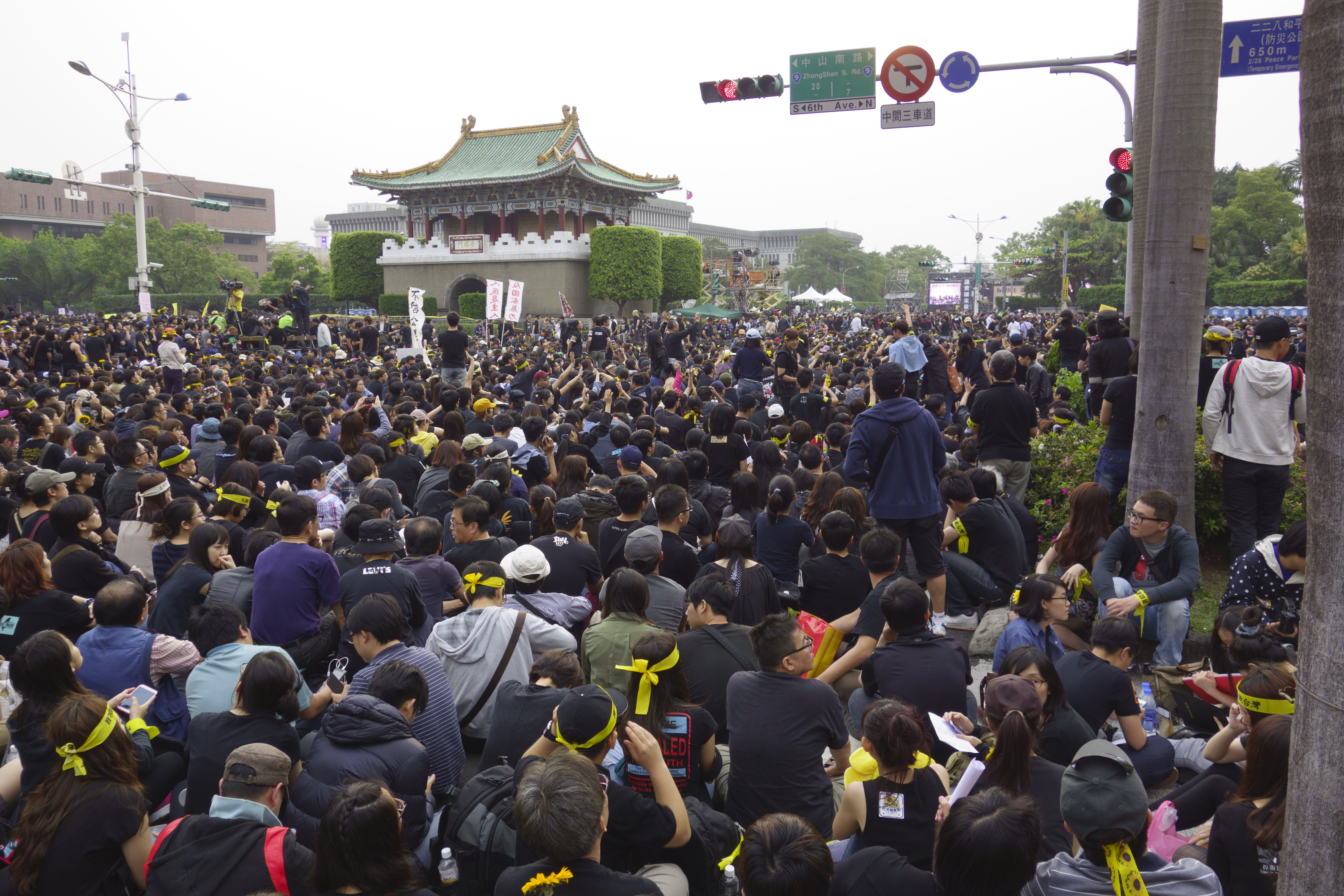 DSC00465 2014 太陽花學運與反服貿遊行